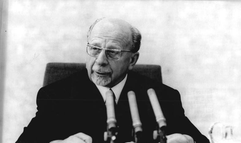 Zentralbild Koard 19.6.1970 Berlin: 25. Staatsratstagung. Zu Beginn der 25. Sitzung des Staatsrats der DDR am 19.6.70 in Berlin sprach Walter Ulbricht über die Bedeutung der Berufsbildung zur Befähigung der Arbeiterklasse und aller Werktätigen, ihrer Funktion im Klassenkampf unter den Bedingungen des sozialistischen Aufbaus und der wissenschaftlich- technischen Revolution gerecht zu werden.